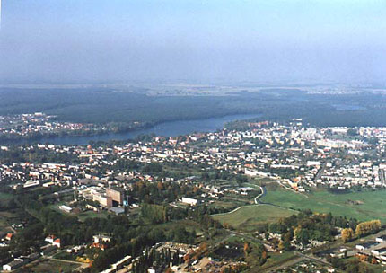 Wągrowiec z lotu ptaka